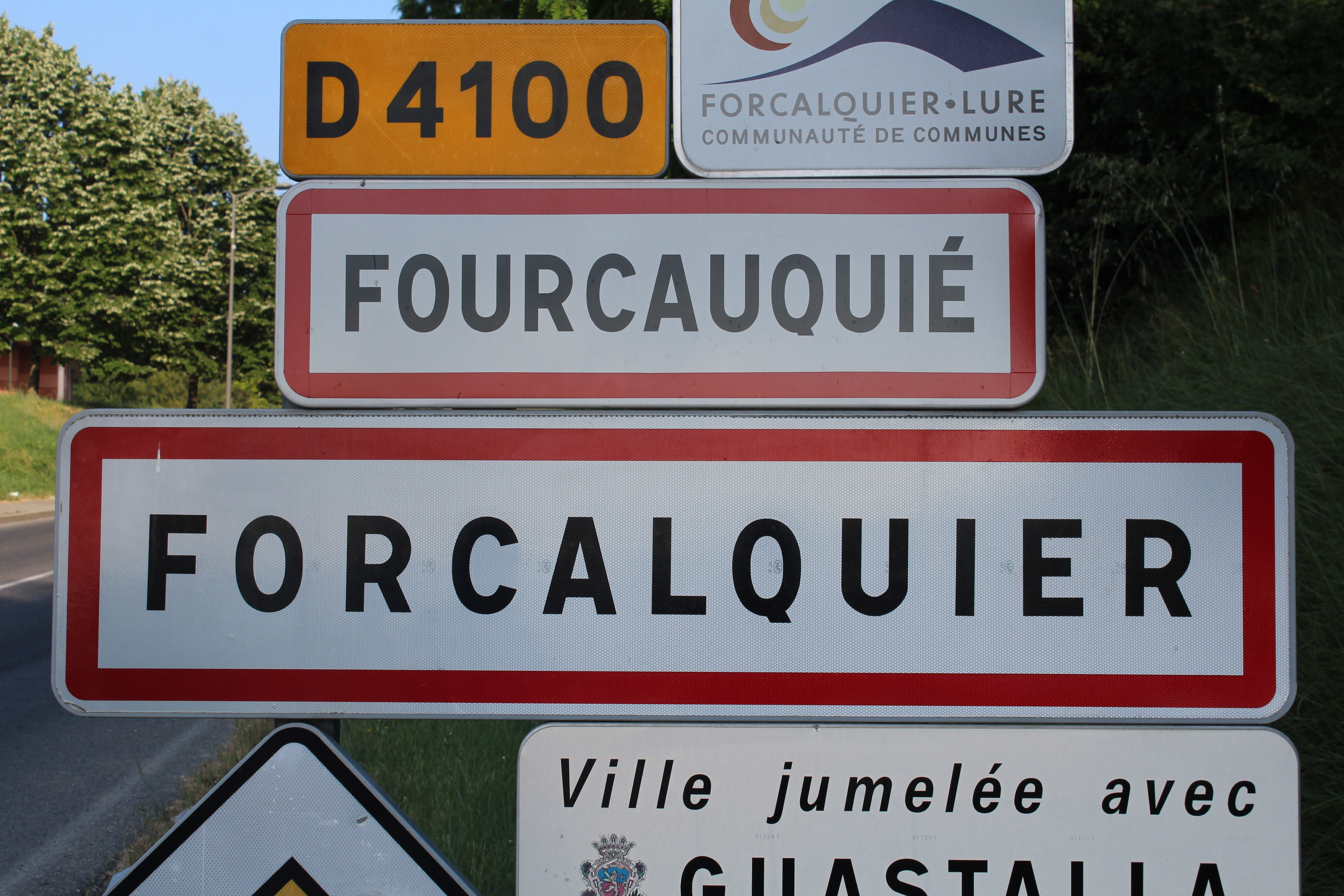 Panneau d'entrée dans Forcalquier avec le nom en occitan au-dessus de celui en français.